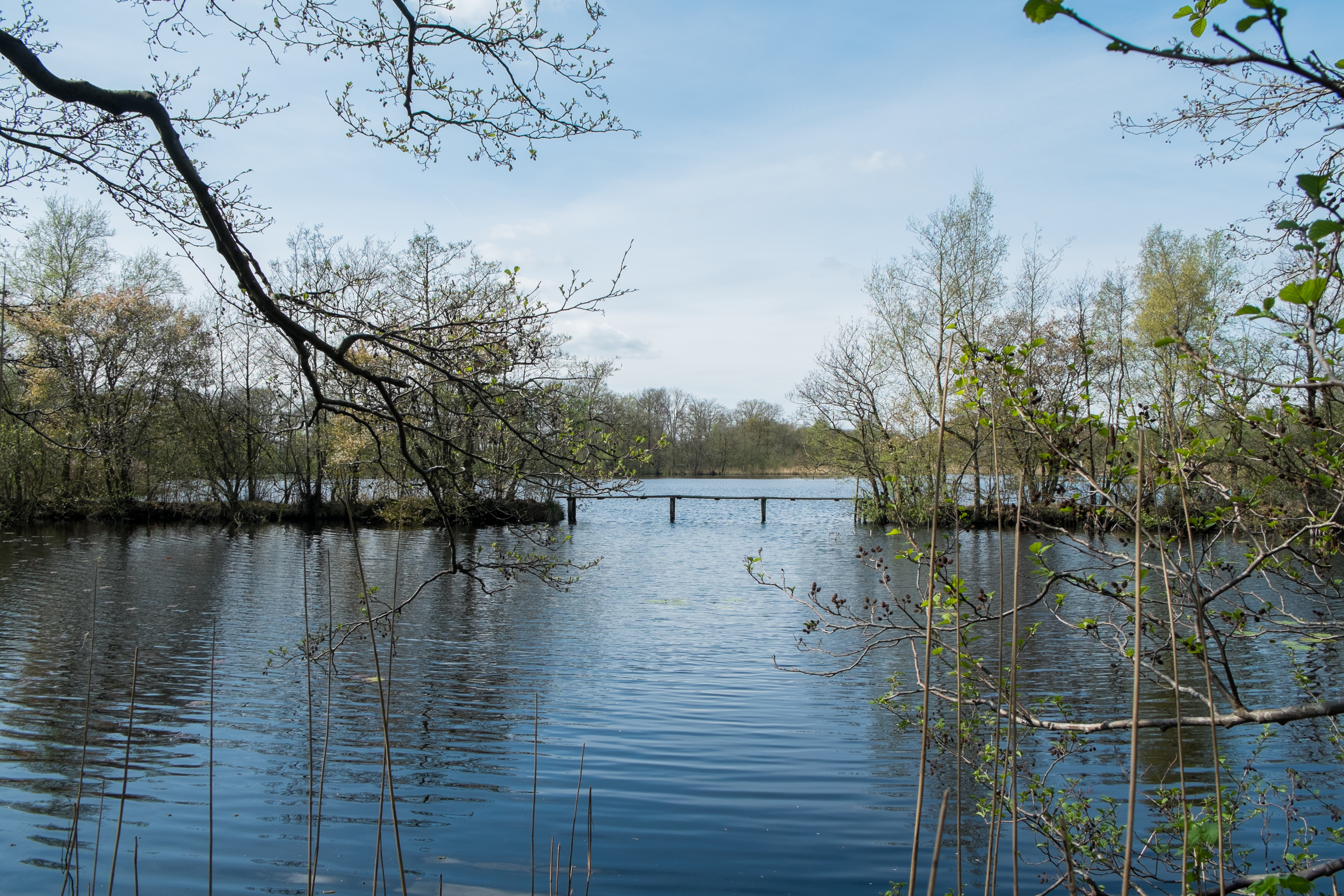 Elsburger Onland vanaf de Groningerweg